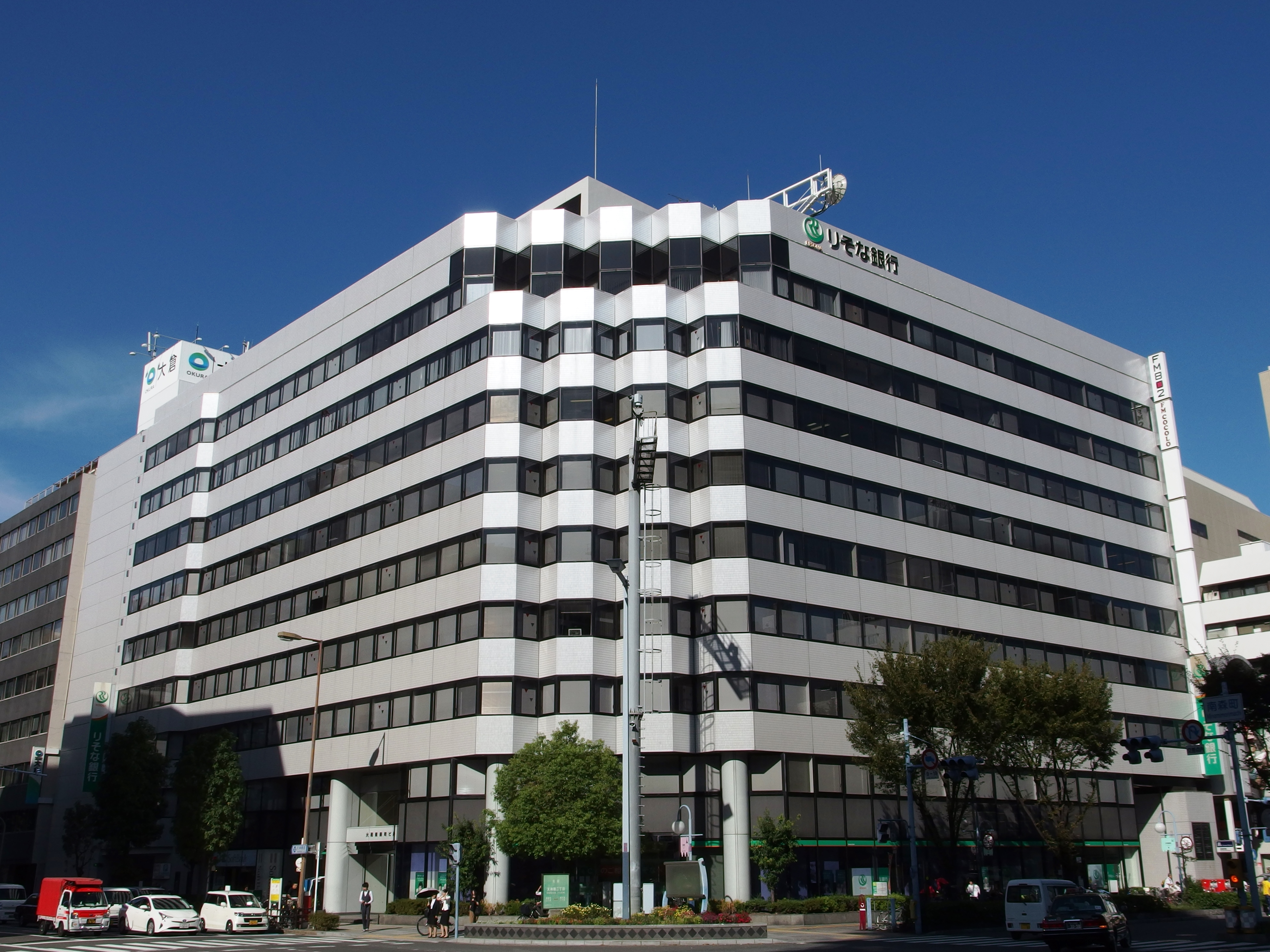 りそな銀行南森町支店を構える大和南森町ビル。上層階にはFM802とFM COCOLOが入る。屋上のパラボラアンテナは飯盛山送信所へ向けられている。